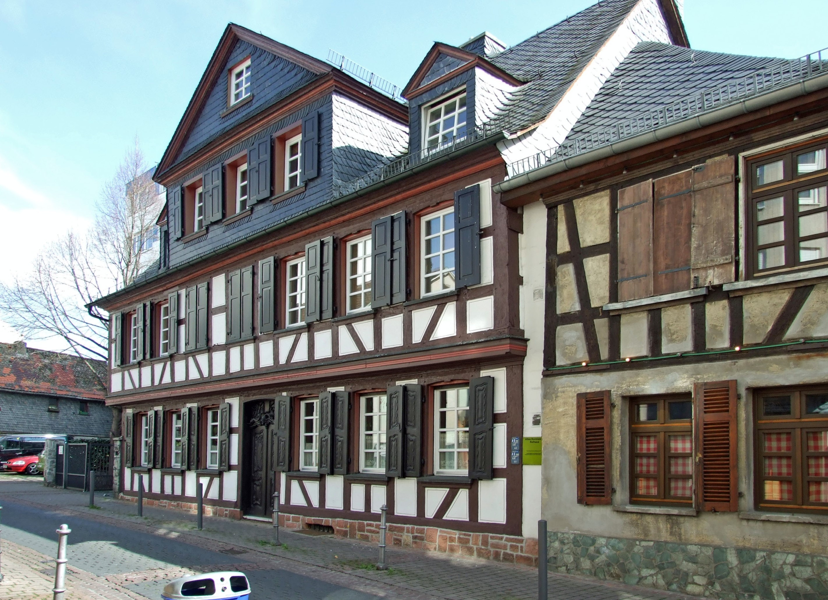 „Altes Rathaus“ an der „Berger Strasse“, nach Kreuzung „Falltorstrasse“ in Richtung Nord, Ffm-Bornheim